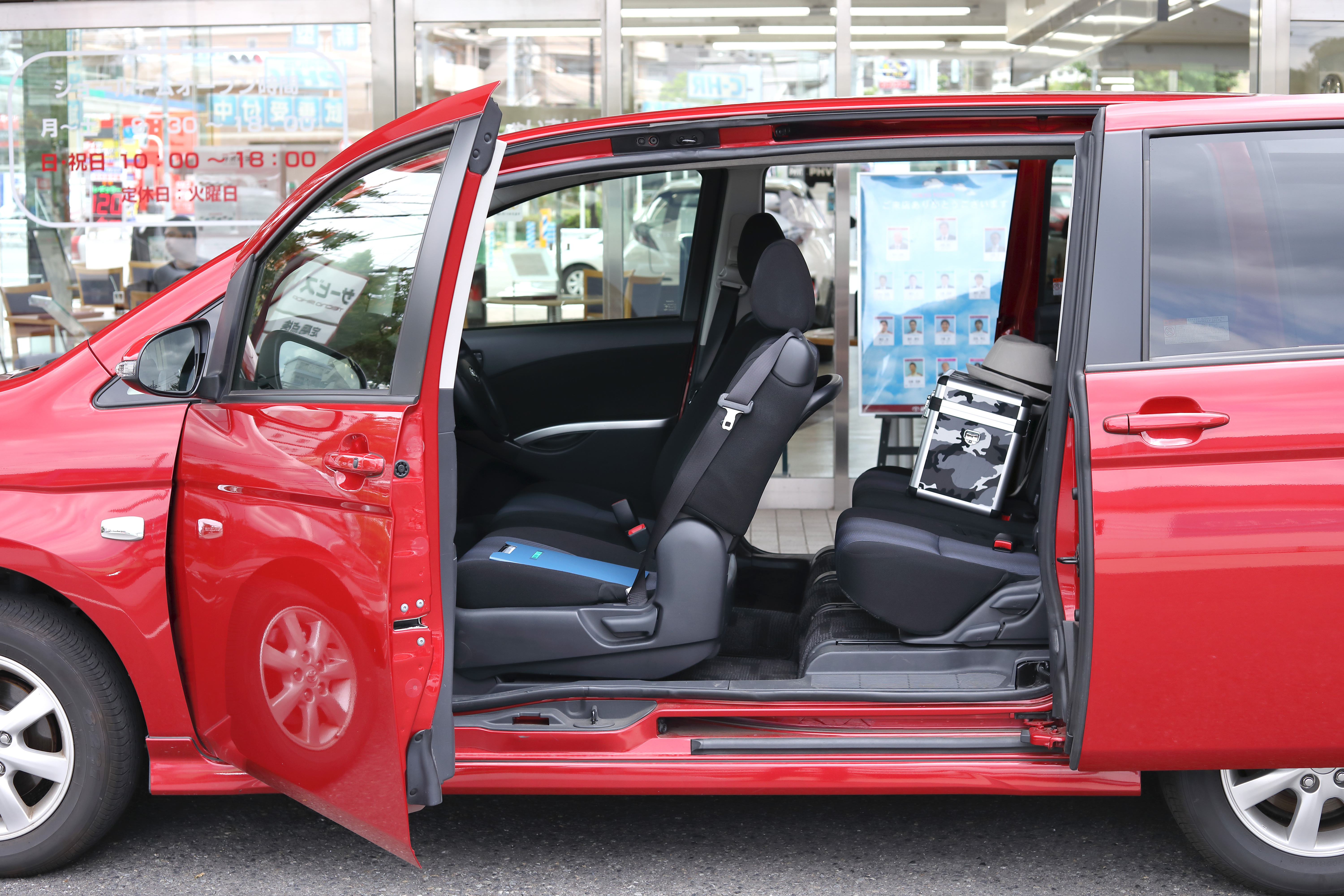 トヨタ・アイシスの左側ドア